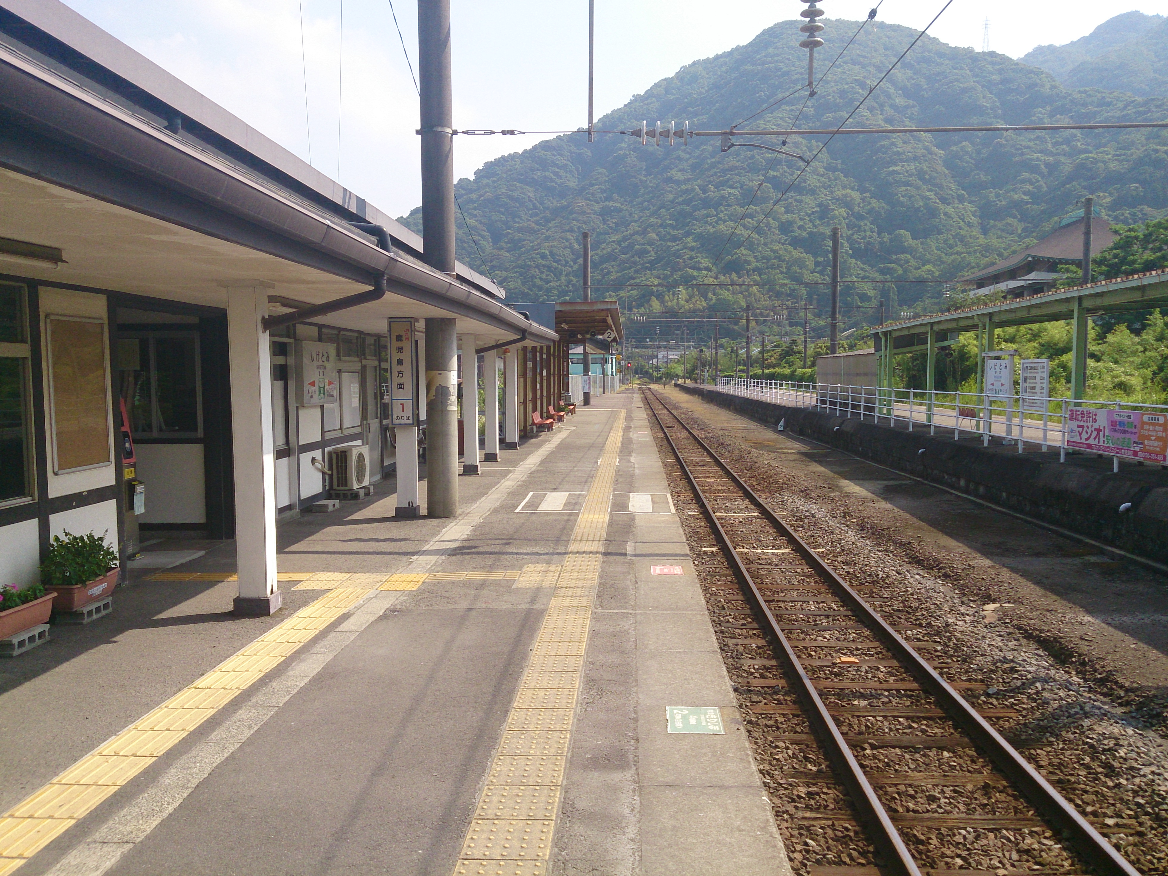 姶良駅 ホーム（鹿児島方）